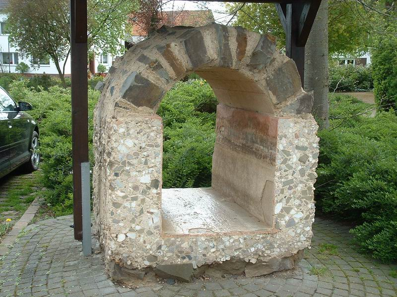 Beschreibung: ausgegrabenes Original-Stück der Eifelwasserleitung, ausgestellt in Buschhoven bei Bonn Quelle: Fotografiert am 19. April 2004 Fotograf oder Zeichner: Matthias Habel, Bonn Copyright Status: GNU Freie Dokumentationslizenz